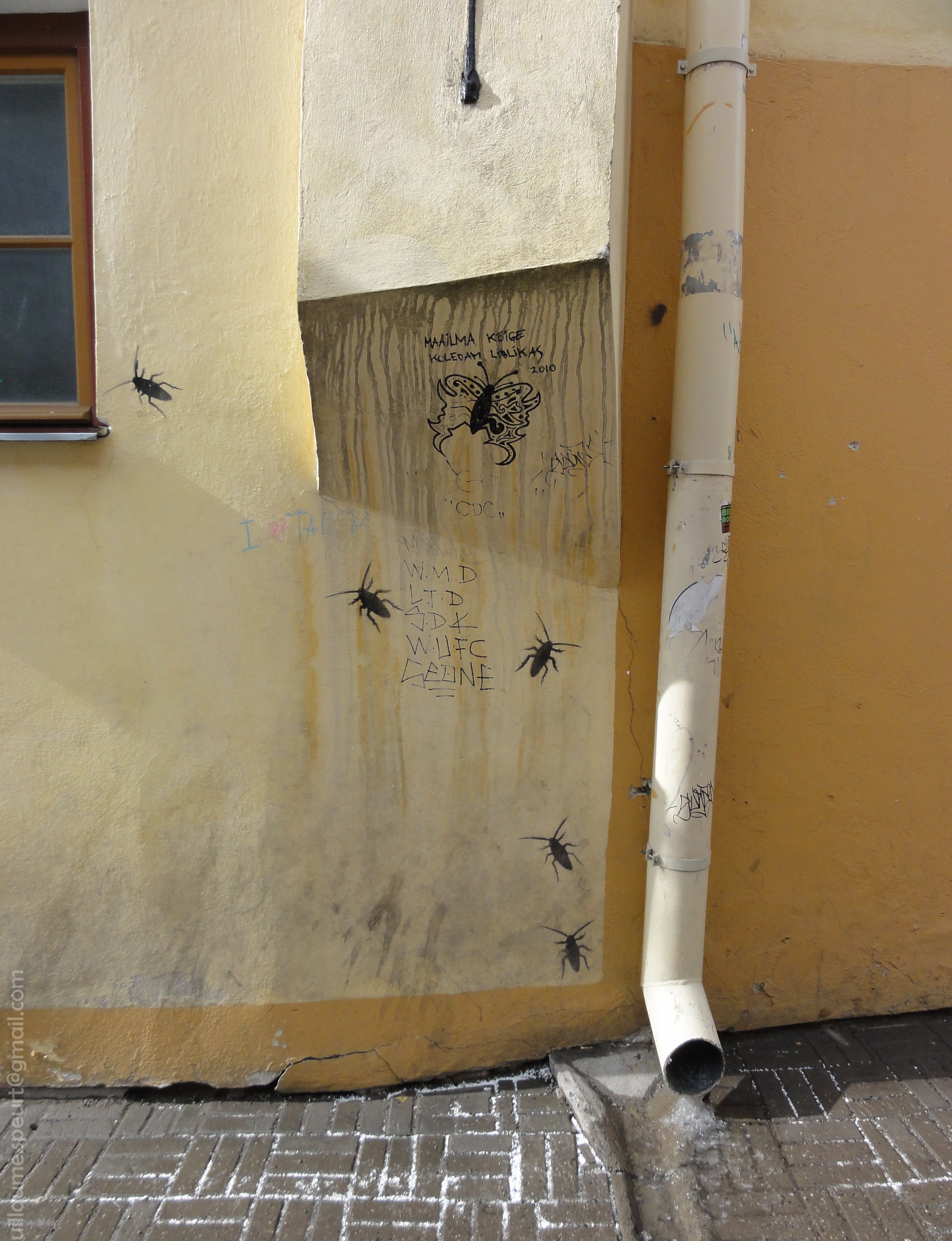 Tallinn, Estonia